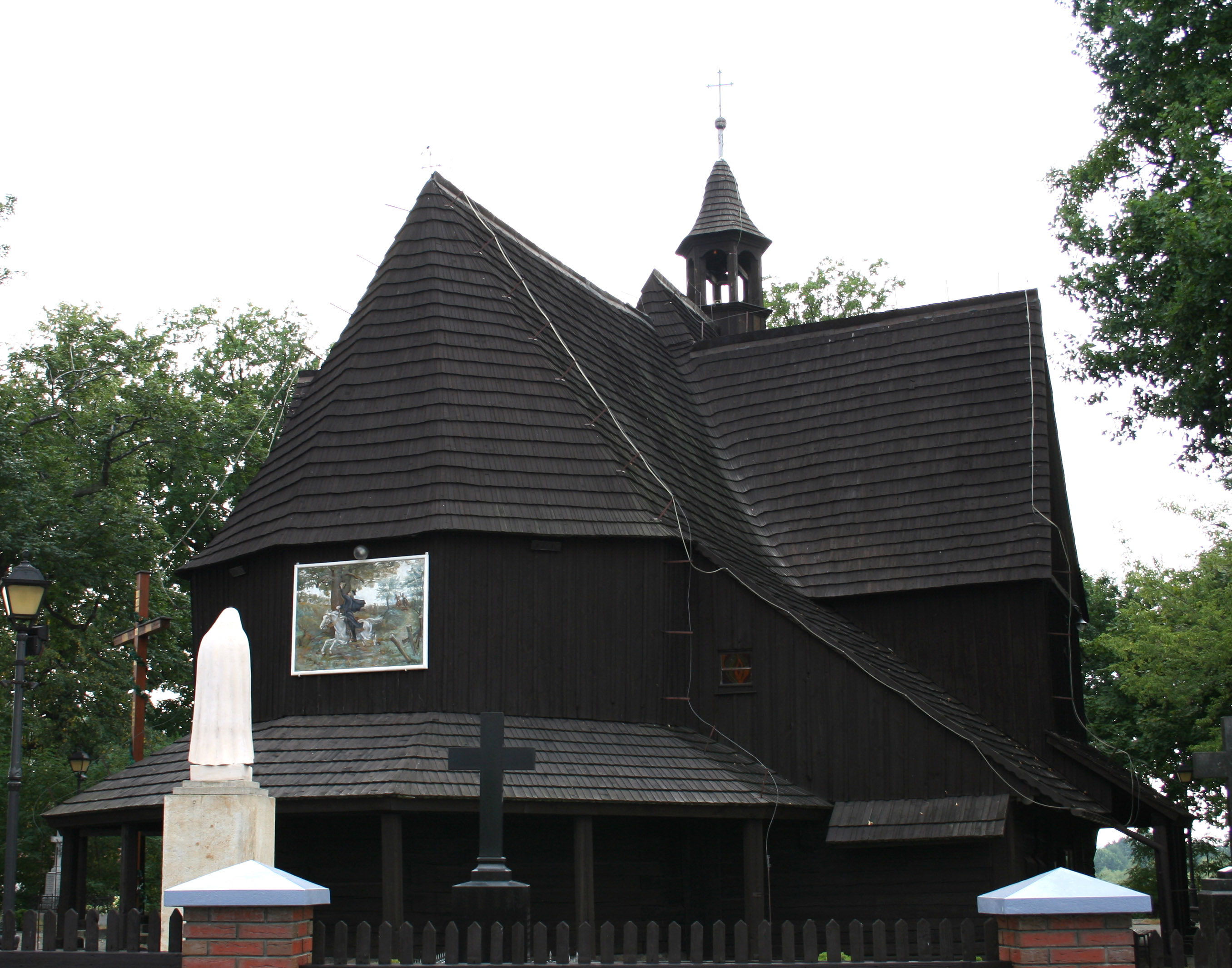 Sanktuarium Bożego Ciała w Jankowicach Rybnickich